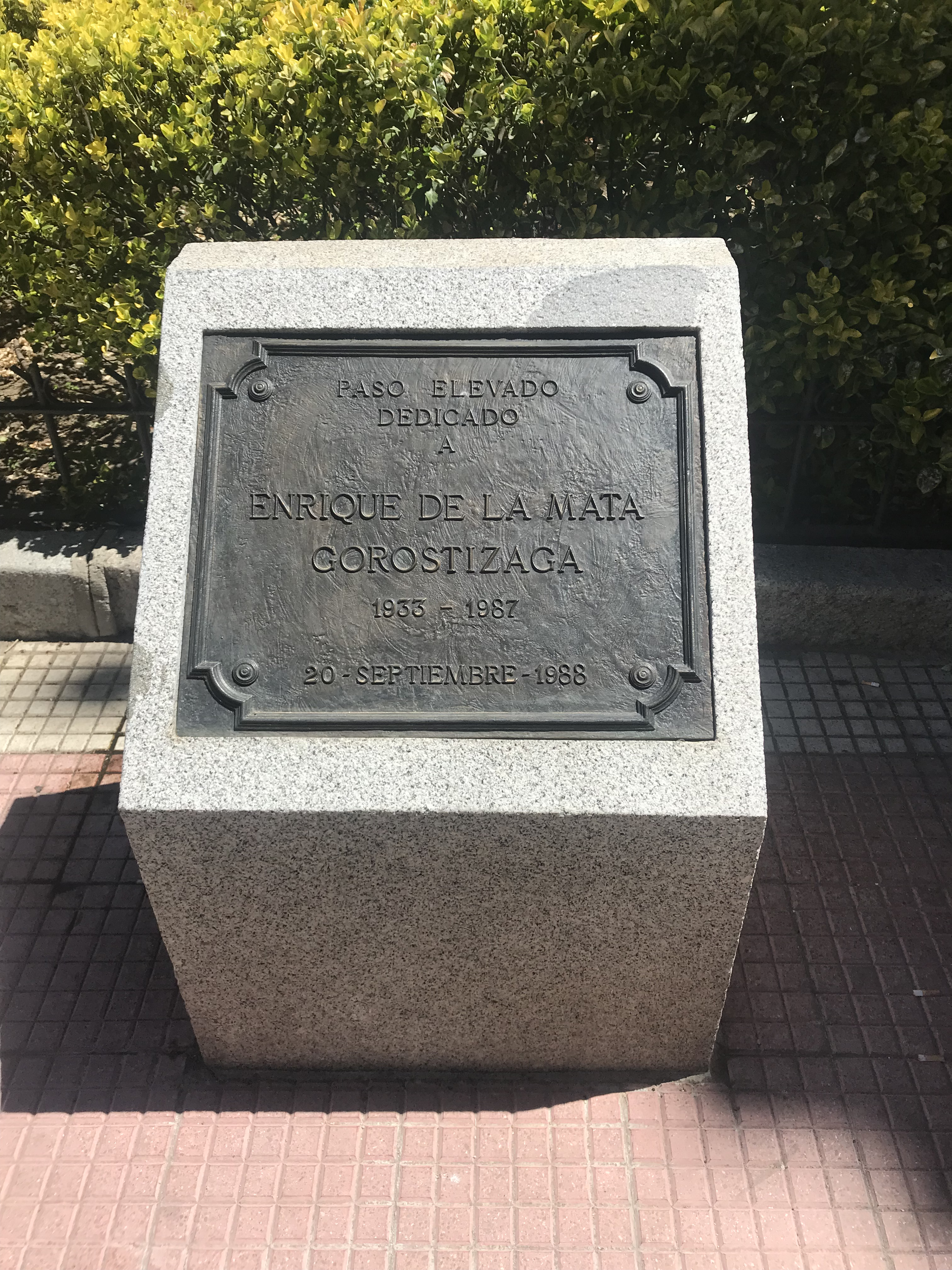 Placa a Enrique de la Mata Gorostizaga en la plaza de Rubén Dario